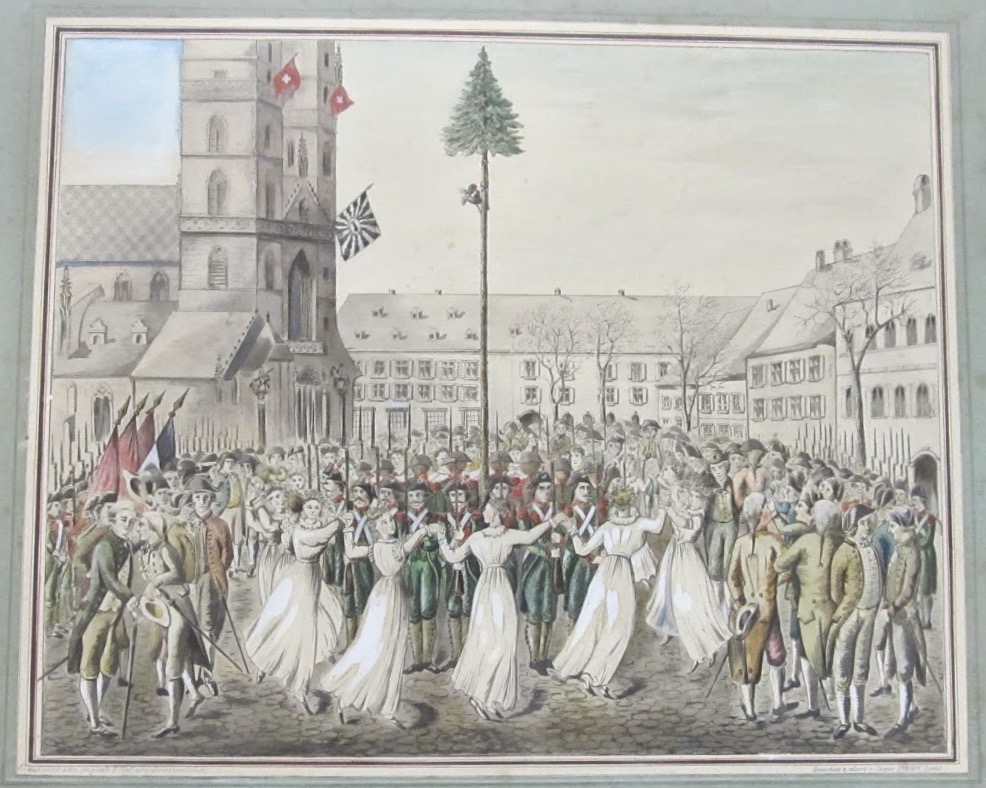 Tanz um den Freiheitsbaum in Basel, 22. Januar 1798. Suworow-Museum Linthal.